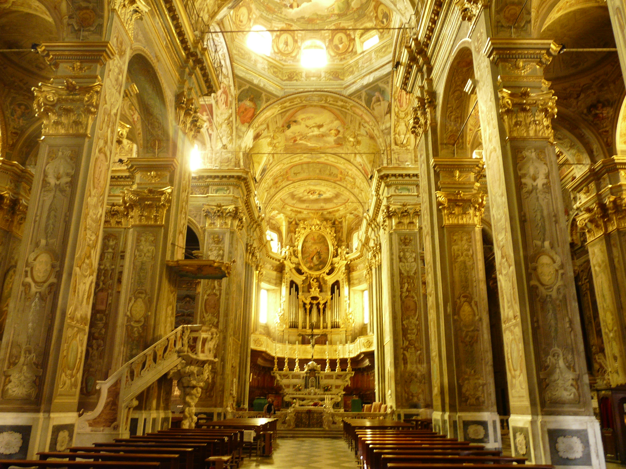 Chiesa di San Biagio, Finalborgo, Finale Ligure, Liguria, Italia